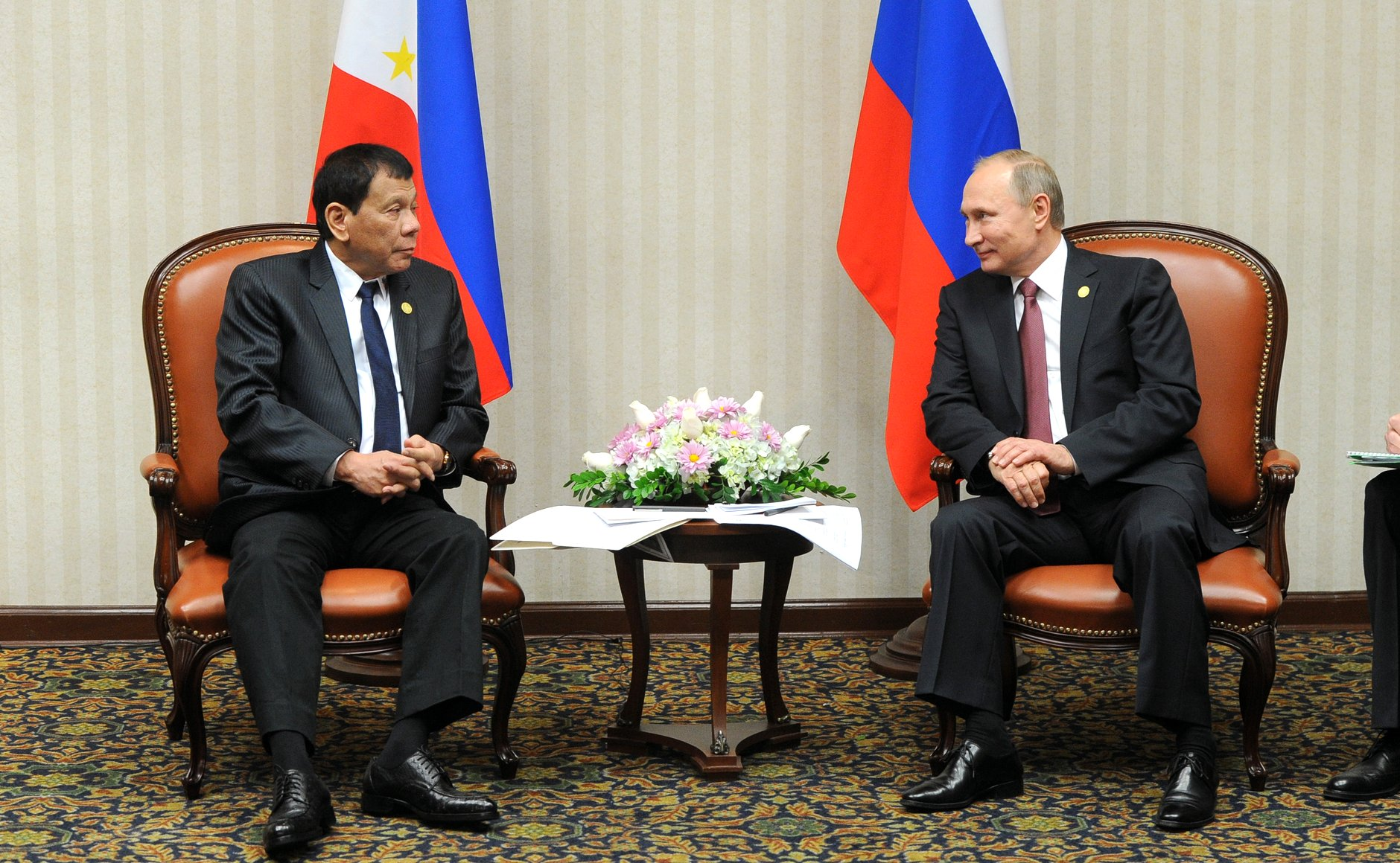 Встреча Президента России Владимира Путина и Президента Республики Филиппины Родриго Дутерте